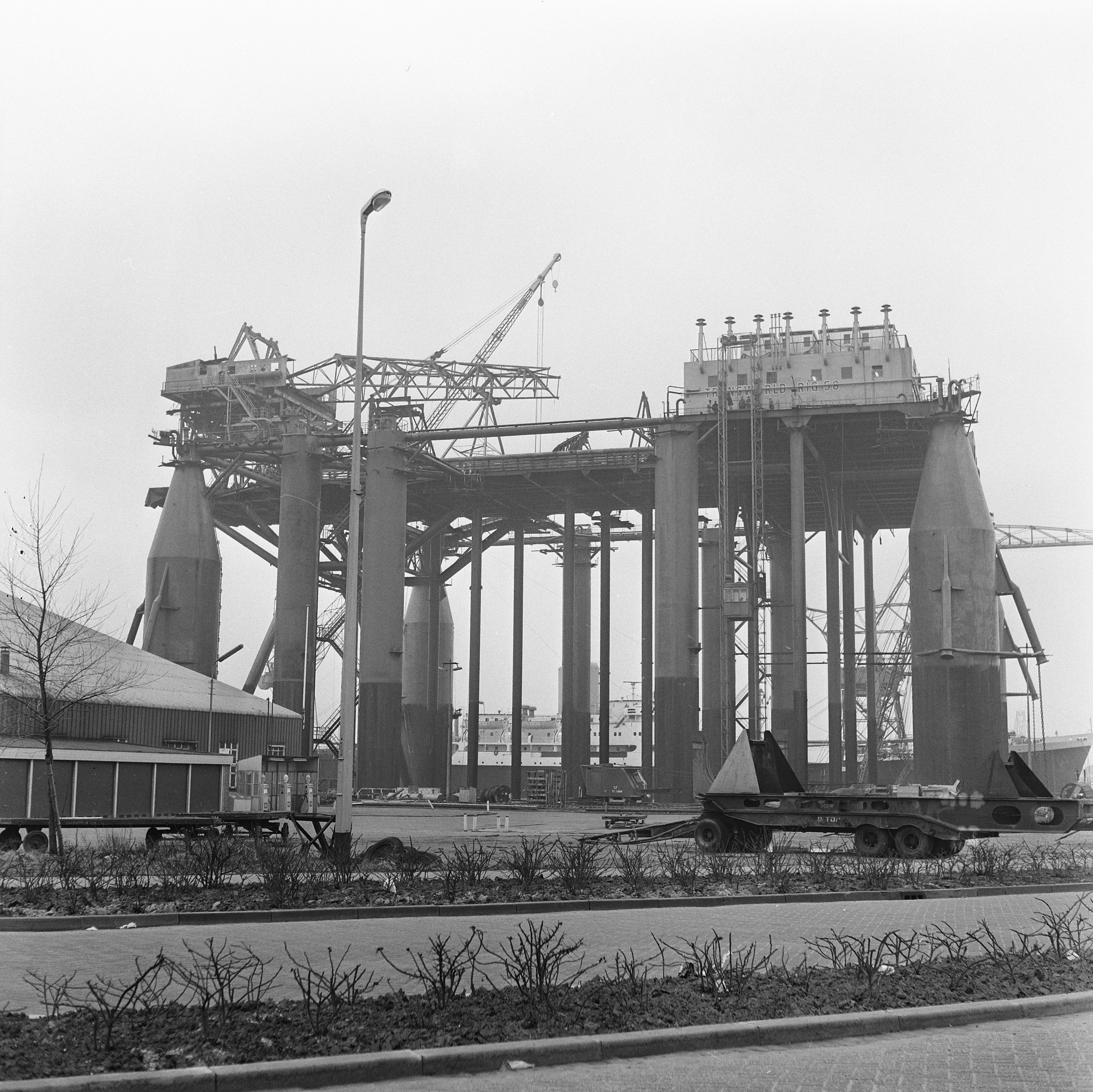 Collectie / Archief : Fotocollectie Anefo Reportage / Serie : [ onbekend ] Beschrijving : Amerikaans booreiland Transworld Rig 58 bij Wilton-Fijenoord bijna gereed Datum : 7 februari 1966 Trefwoorden : Boorplatforms Instellingsnaam : Transworld Rig 58, Wilton-Fijenoord Fotograaf : Voets, Jan / Anefo Auteursrechthebbende : Nationaal Archief Materiaalsoort : Negatief (zwart/wit) Nummer archiefinventaris : bekijk toegang 2.24.01.03 Bestanddeelnummer : 918-7585